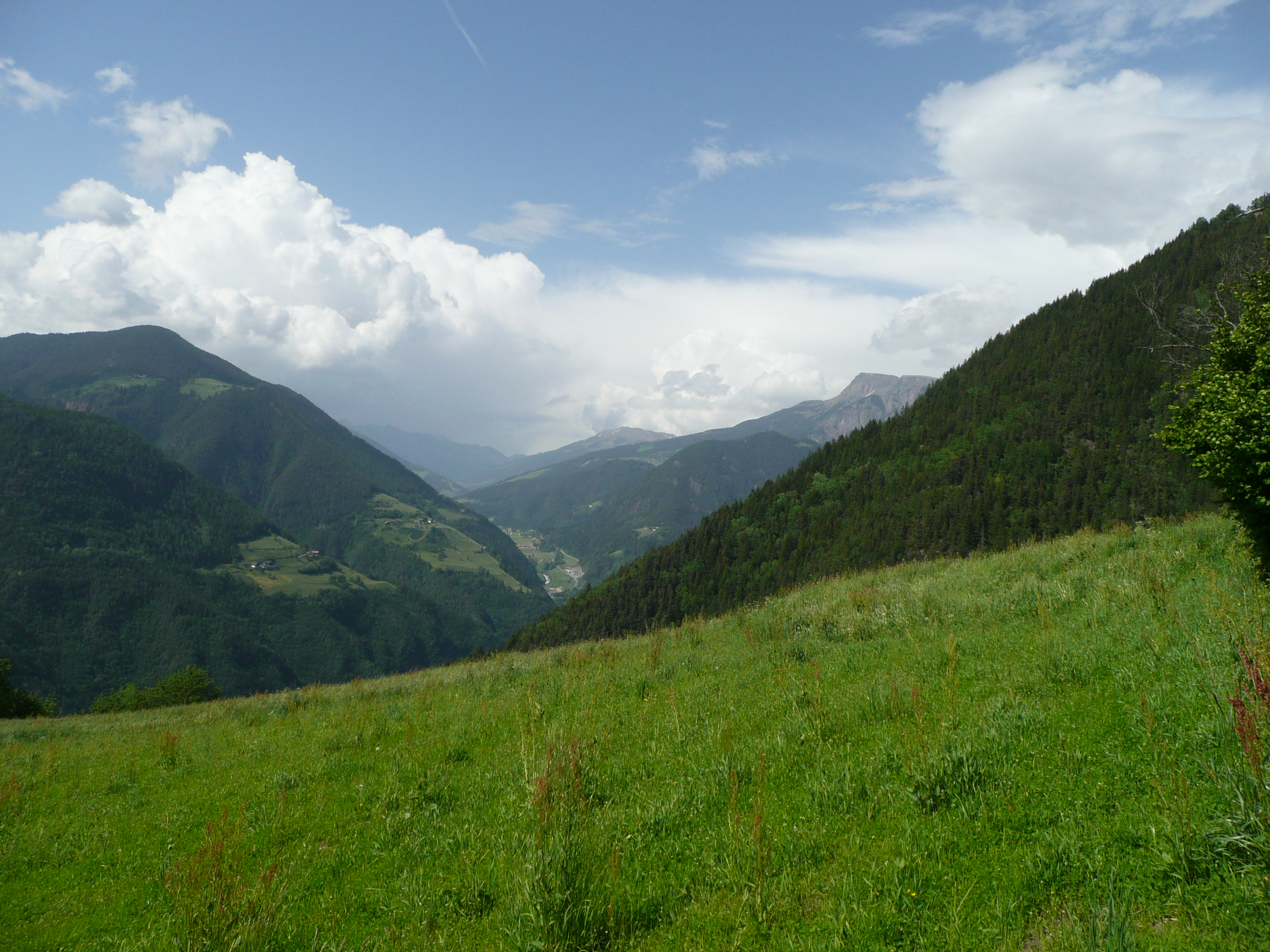 Val Sarentina con Forcella Sarentina e Cima Rodella